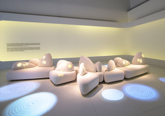 NEMURI EXHIBITION